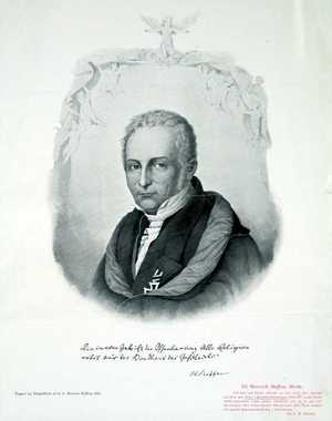 Litografi med trykt sitat av Henrik Steffens. Nederst til venstre med rødt trykk, en oppfordring av kunstneren, delvis skrevet på latin. Innskrift: Tegnet og litografert af O.P.Hansen Balling 1845.: Til Heinrich Steffens Minde. Ved dette mit første arbeide og mit sidste dito, hvortil jeg ikun gav Eder i Kunstnerforeningen Tittelen: multa licent stultis pictoribus atque poetis, foreslaar jeg at vi ved vor 50-Aarsfest eller Universitetets 100-Aarsfest skal have dannet det norske Kunstakademi her i Christiania. Ole P.H.Balling Eier: Aulestad